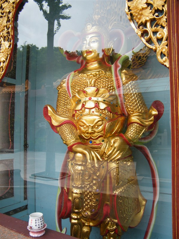 韦驮像 雕工精湛 2009.8.3 拍于青云岩